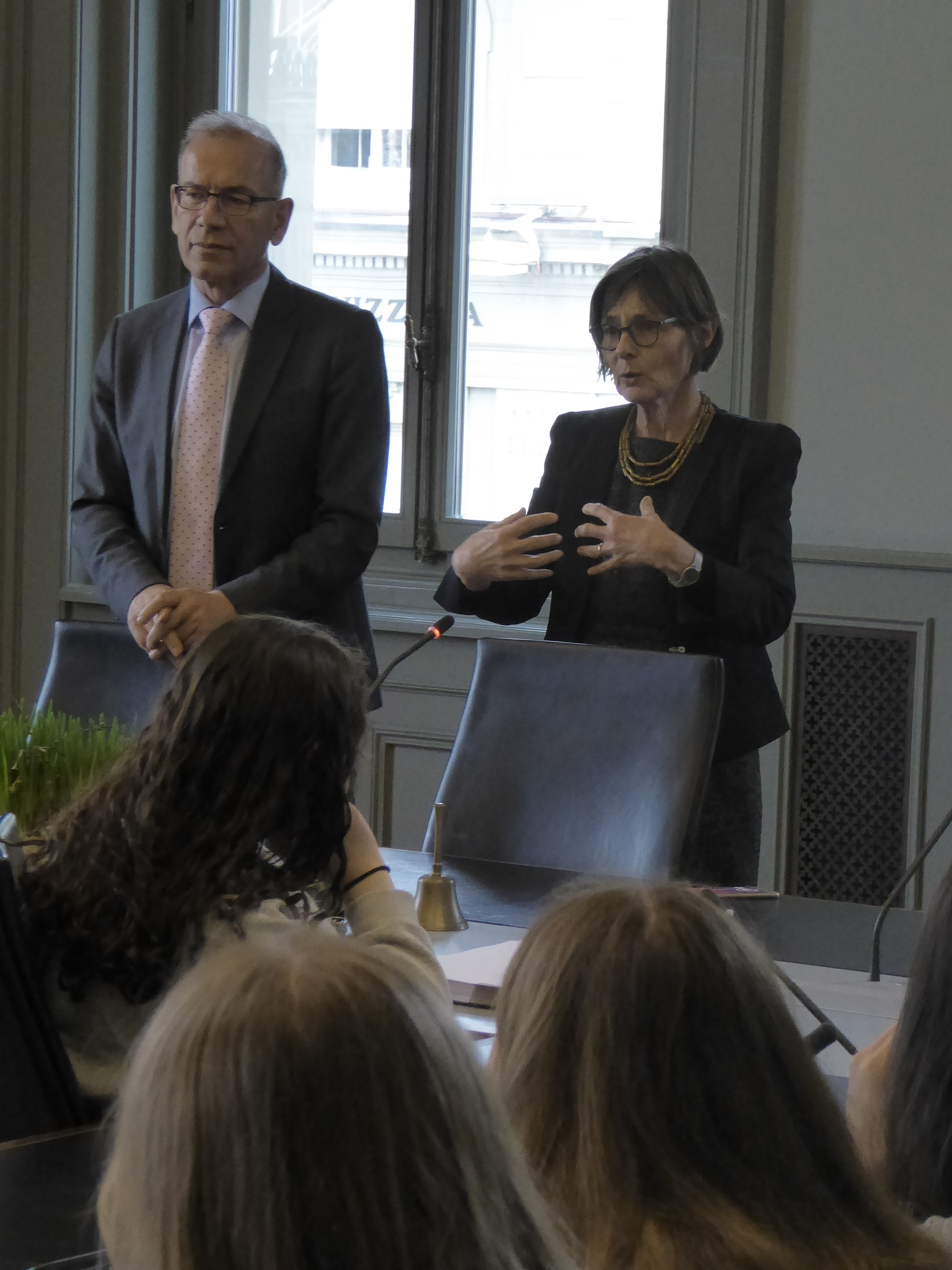 Ständerat Hannes Germann und Nationalrätin Martina Munz